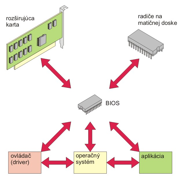 BIOS data flow